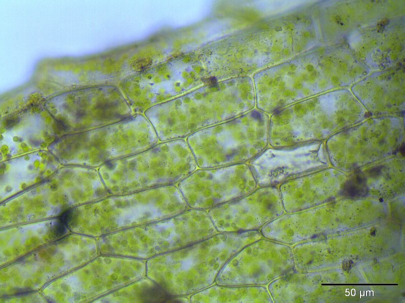 Birnförmiges Blasenmützenmoos (Physcomitrium pyriforme), Laminazellen, Vergrößerung: 400x